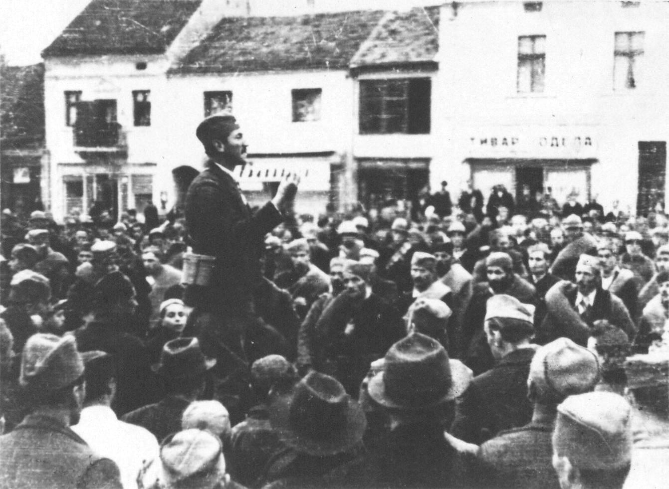 Srpskohrvatski / српскохрватски: Ratko Mitrović, politički komesar Čačanskog odreda, govori narodu i borcima u oslobođenom Čačku, oktobra 1941.